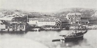 Handelsstedet på Austafjord i Vikna.